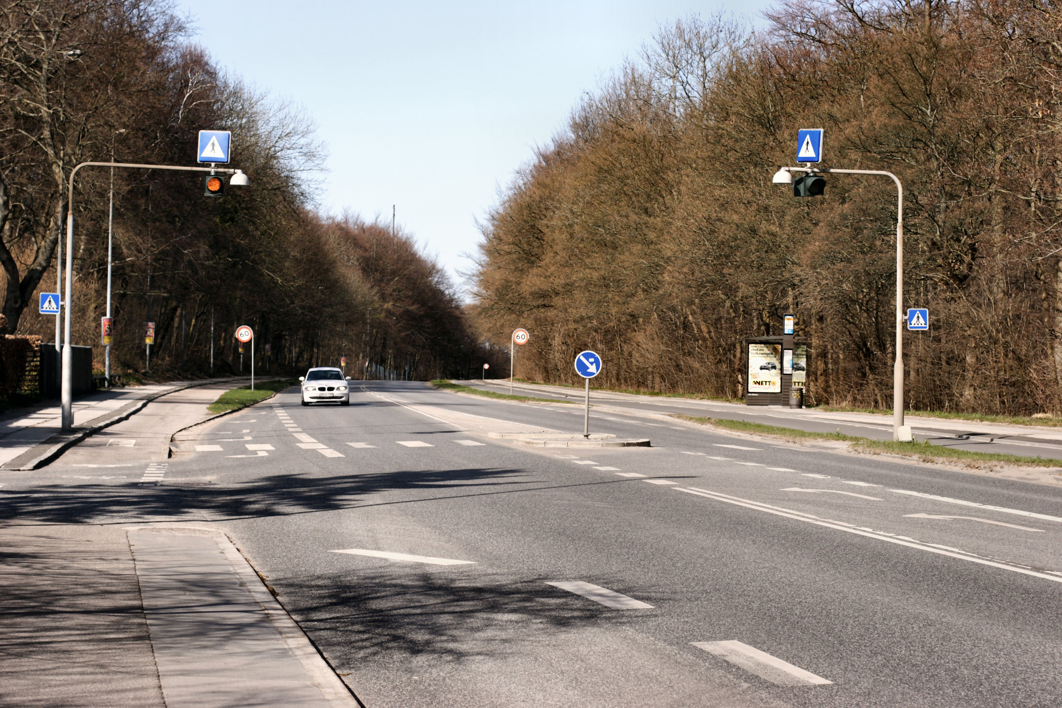 Toronto anlæg (fodgængerfelt med bliklys) på Oddervej i Aarhus, Danmark